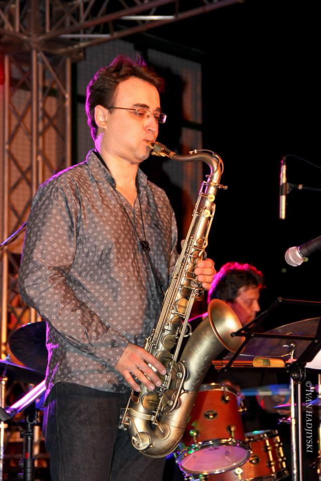 Владко Кърпаров - саксофон